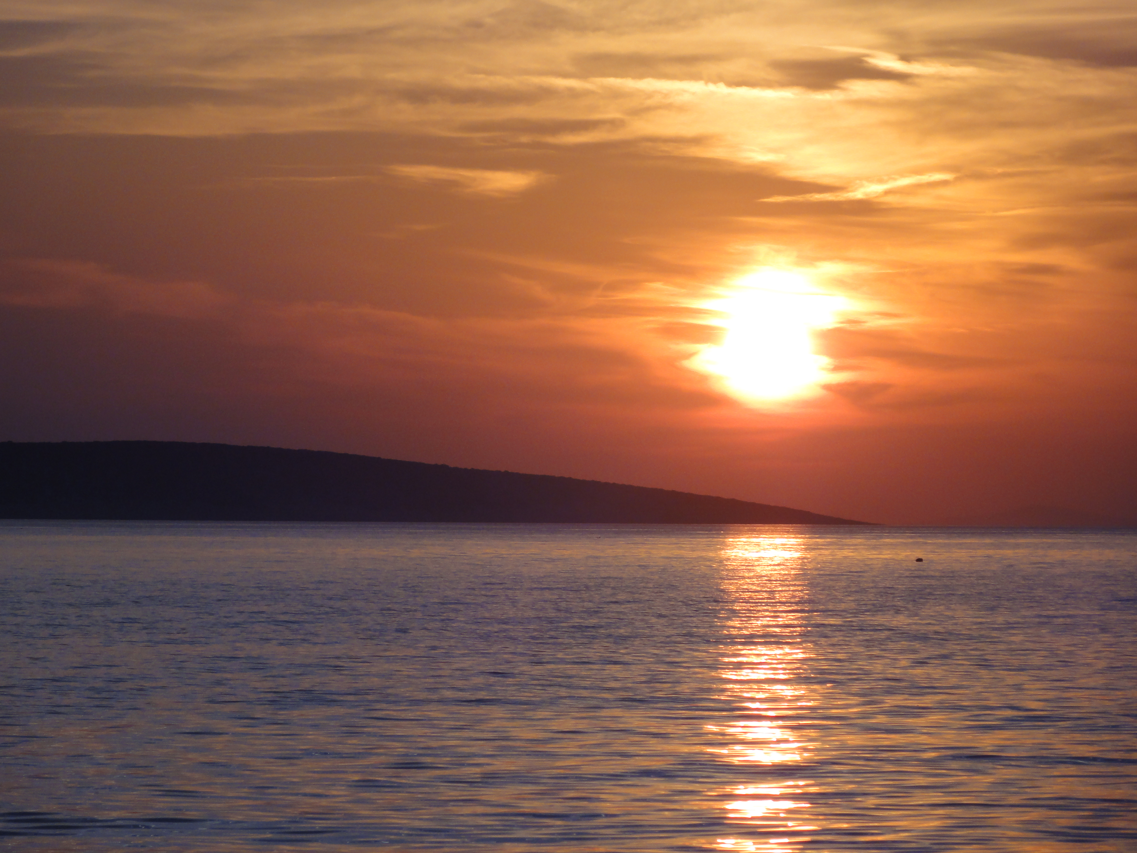 Вид на остров Шкрда с острова Паг